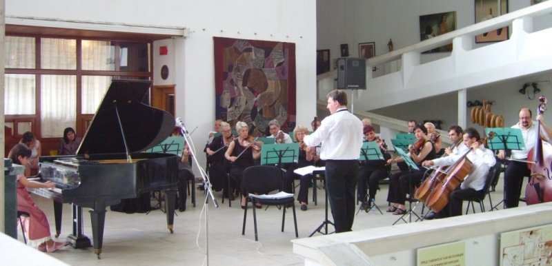 symphony conductor Mladen Stanev